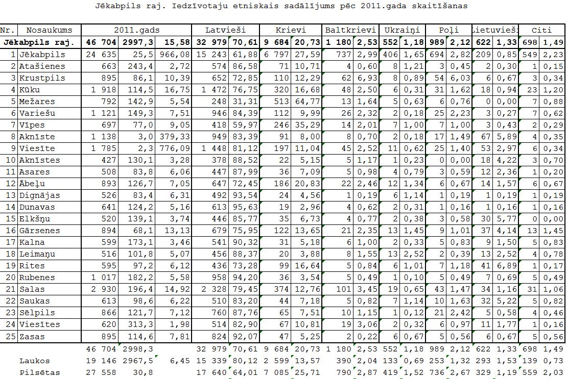 Latvijas 2011.gada tautas skaitīšanas rezultāti.